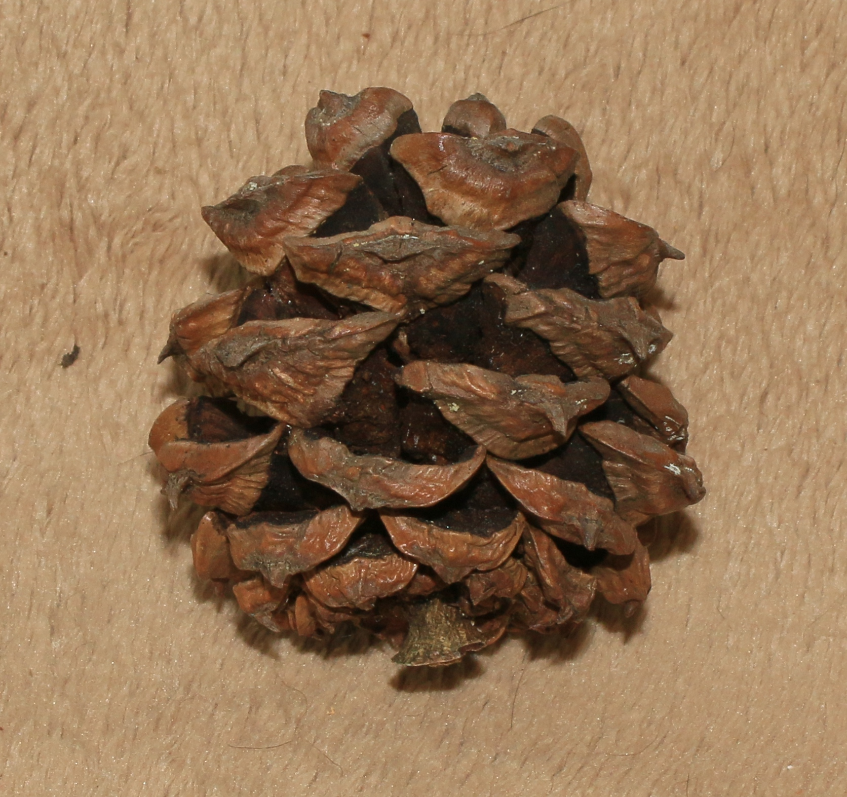 4.5cm.